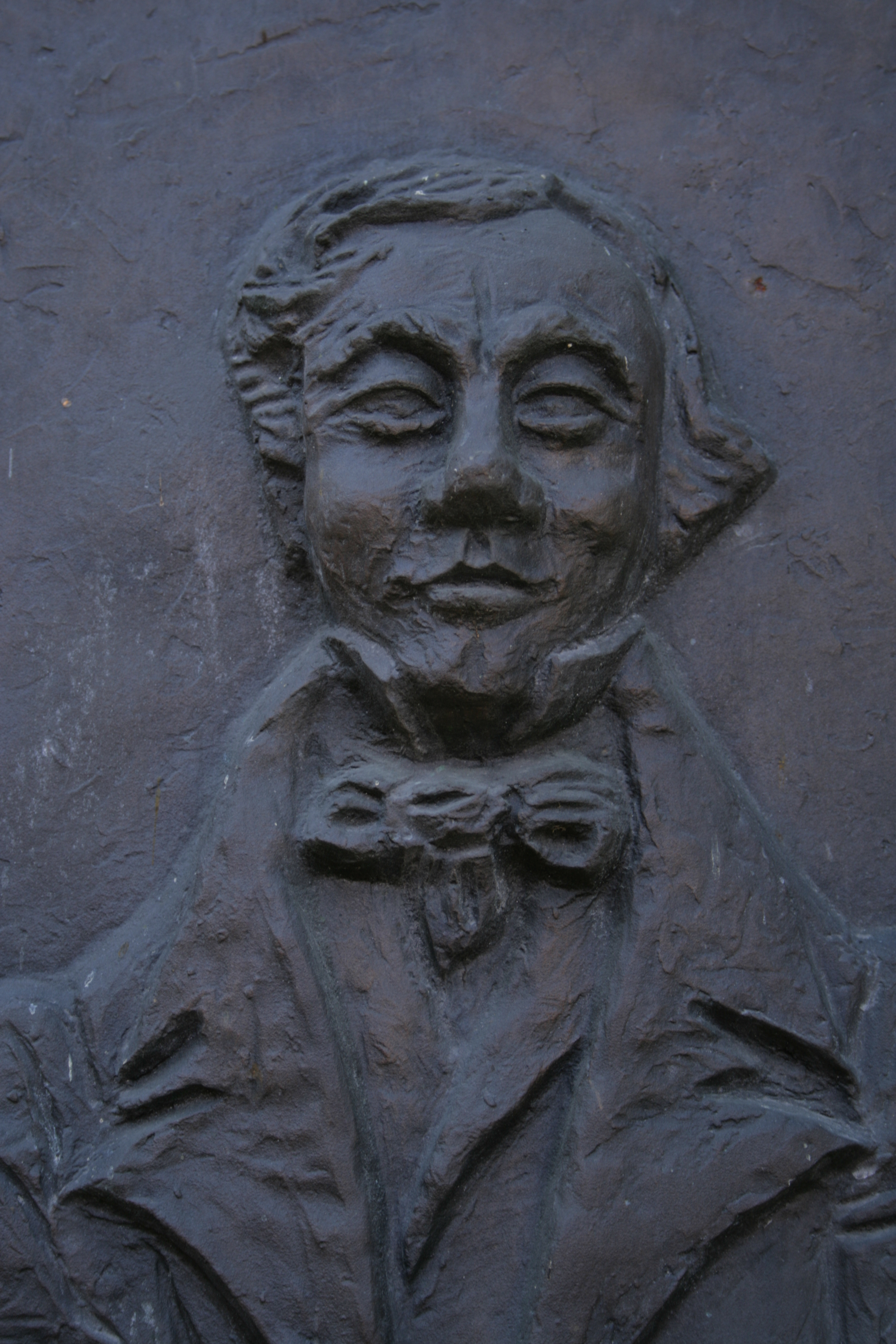 Porträt Tobias Haslinger - Detail aus der Gedenktafel an seinem Geburtshaus